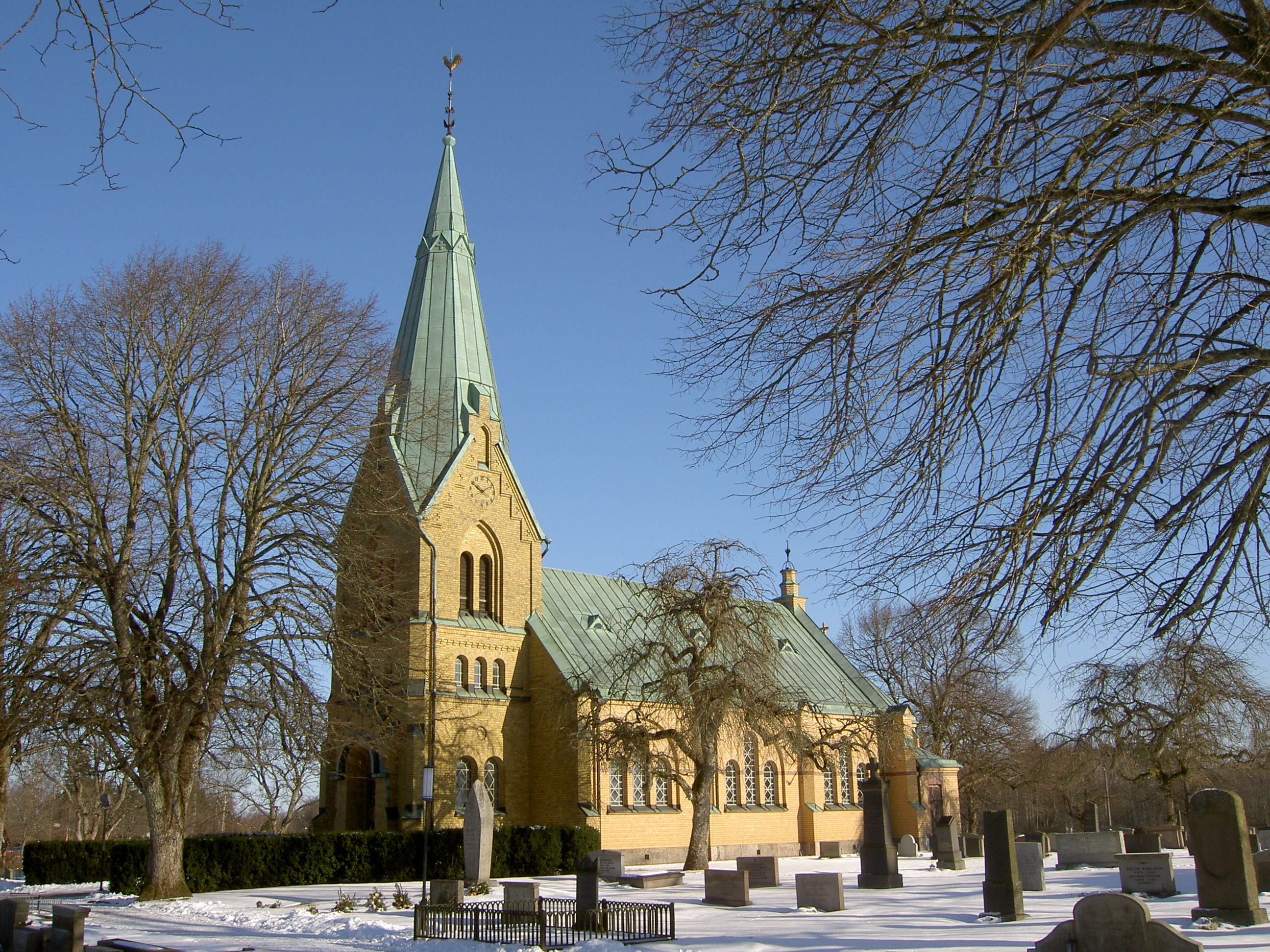 Skånes-Fagerhults kyrka